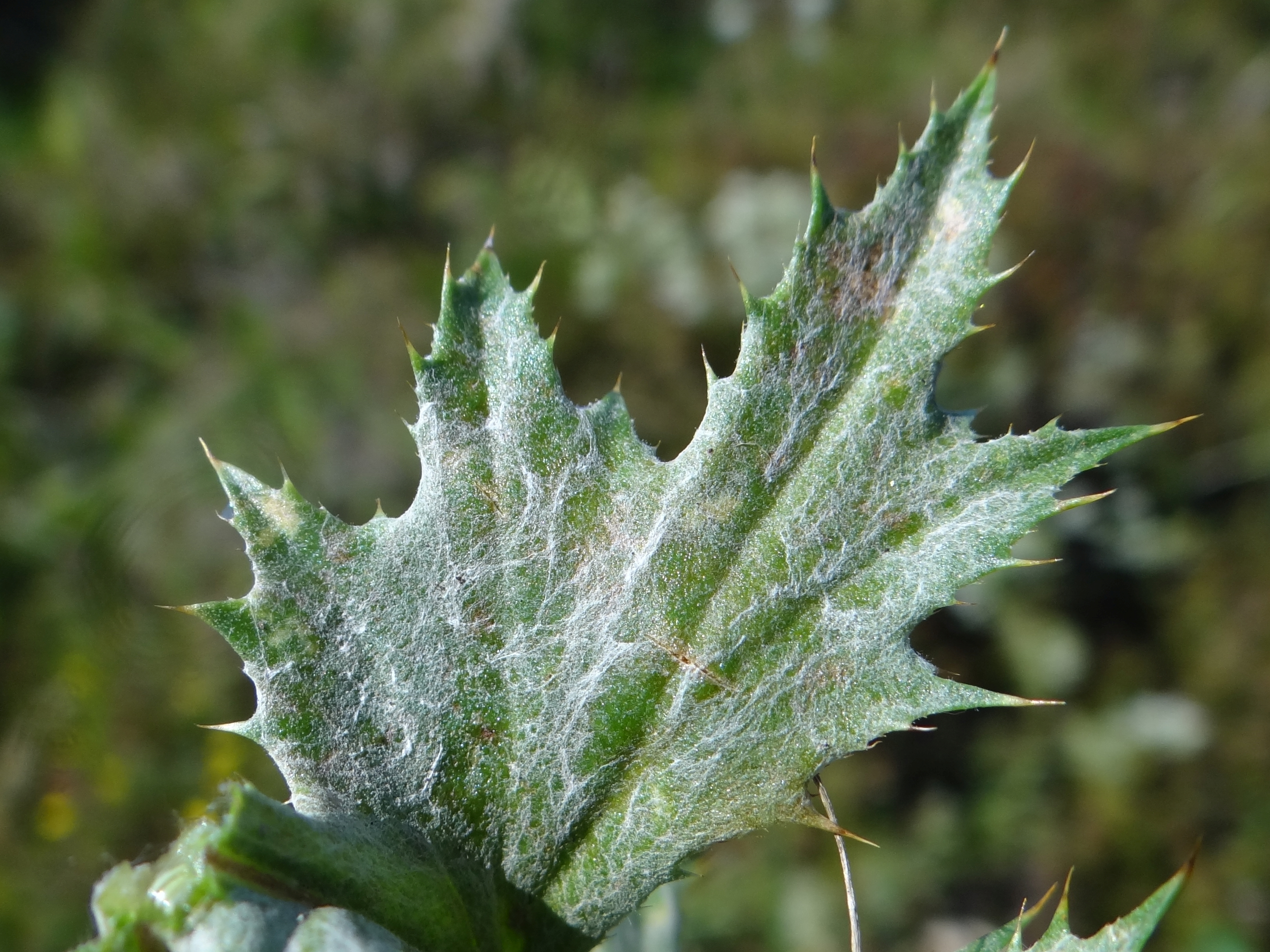 Podosphaera fusca on leaf Cirsium. Location: Poland, Mszana Dolna